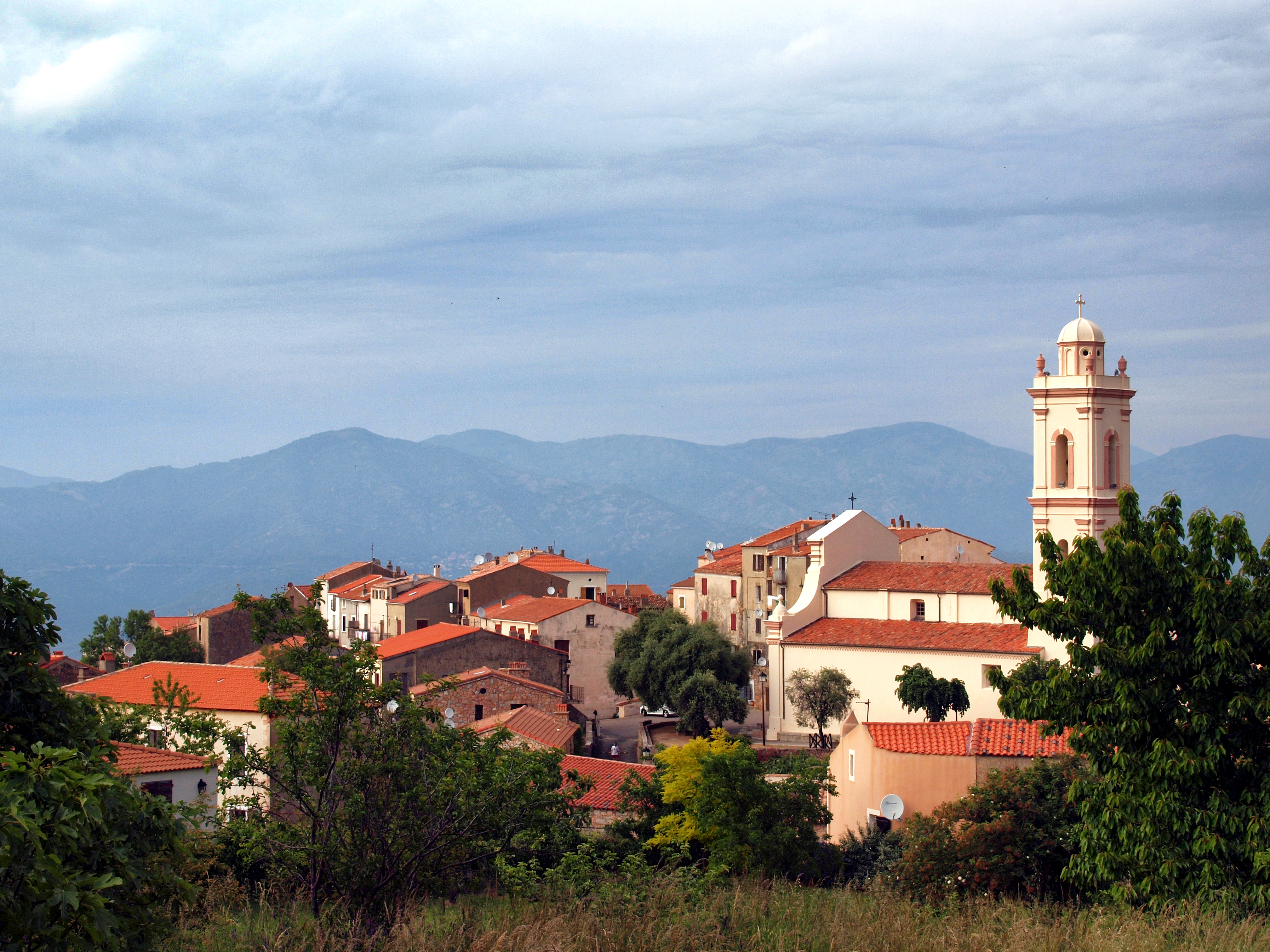 Piana, Corse-du-Sud - Vue de "l'un des plus beaux villages de France" et de son église paroissiale de Santa Maria Assunta